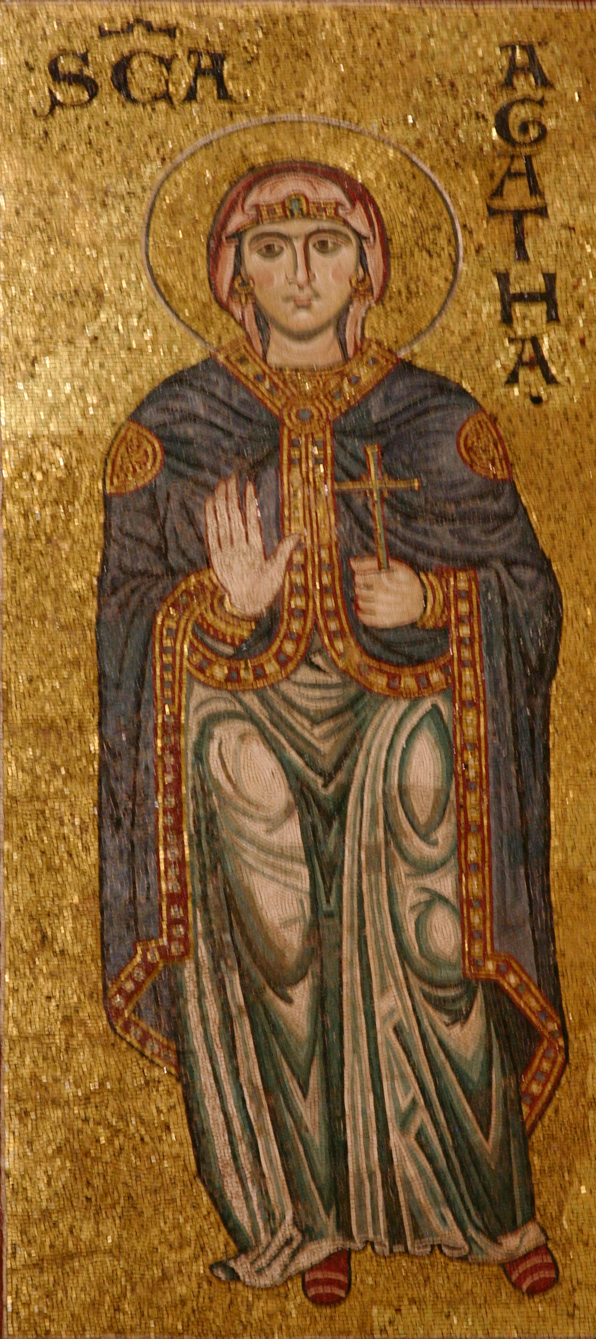 Cathedral of Monreale